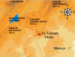 Skizze mit Rundweg